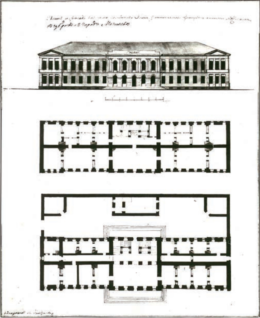 Беларуская (тарашкевіца): Магілёў (Mahiloŭ), пляц Рынак (plac Rynak). Акруговы суд і прысутныя месцы